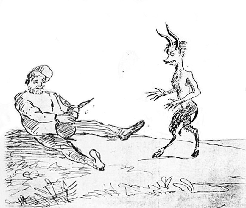 Рисунок Пушкина к рукописи "Сказки о попе и работнике его Балде". Подпись: Балда и Бесёнок.